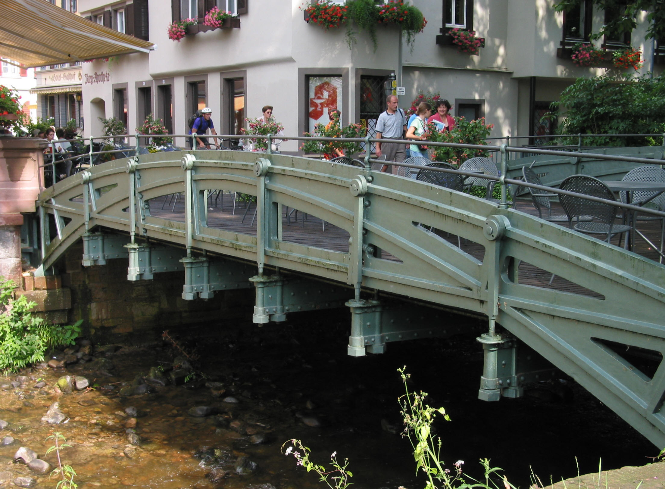 Gusseiserne Brücke in Staufen, Breisgau, Deutschland. Diese Brücke war einstmals Bestandteil der ersten Eisenbahnlinie am Oberrhein.